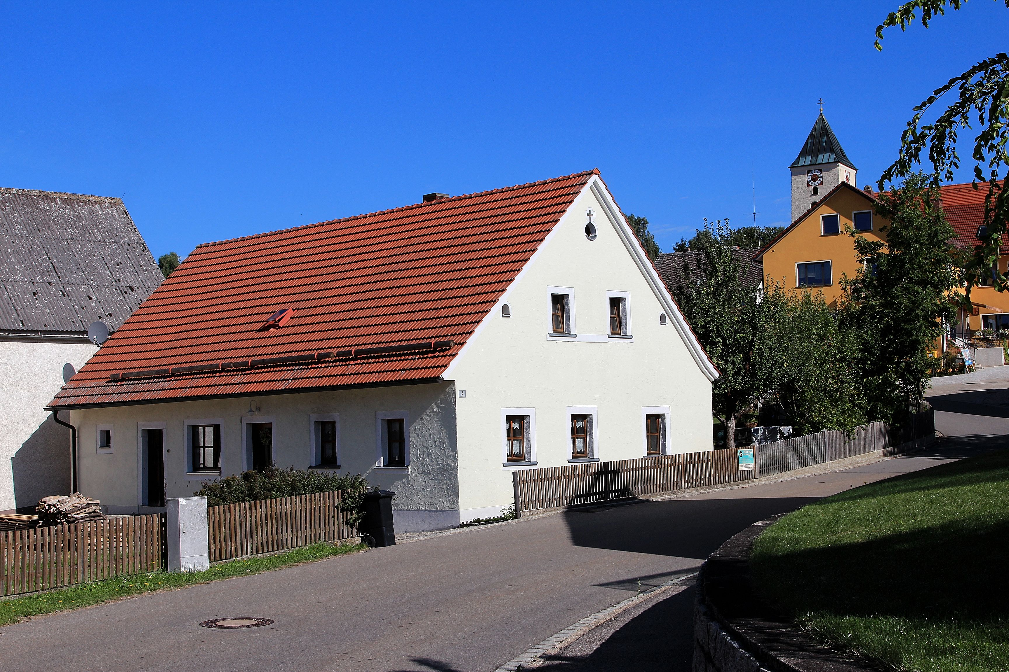 Hauptstraße 8 in Gleiritsch; Gemeinde Gleiritsch, Landkreis Schwandorf, Oberpfalz, Bayern